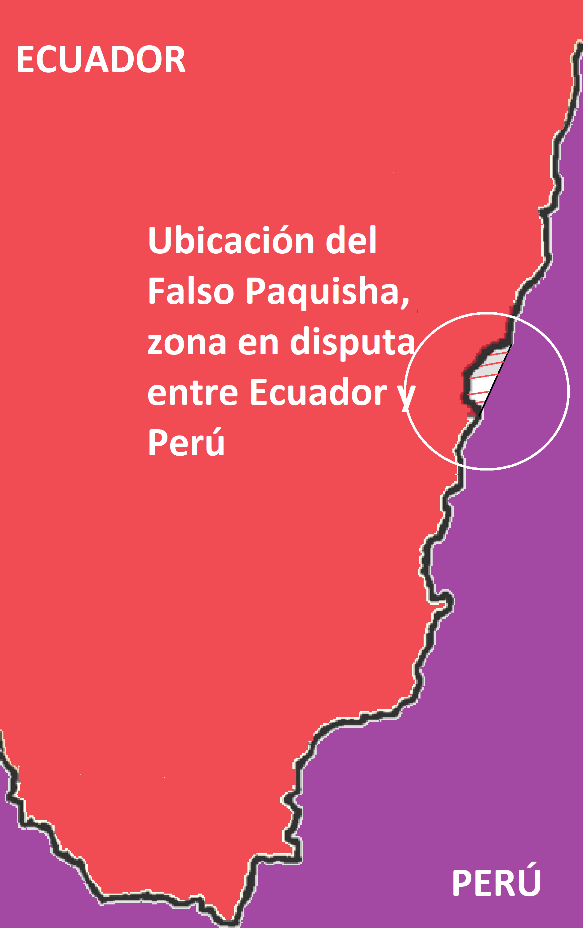 Conflicto del Falso Paquisha